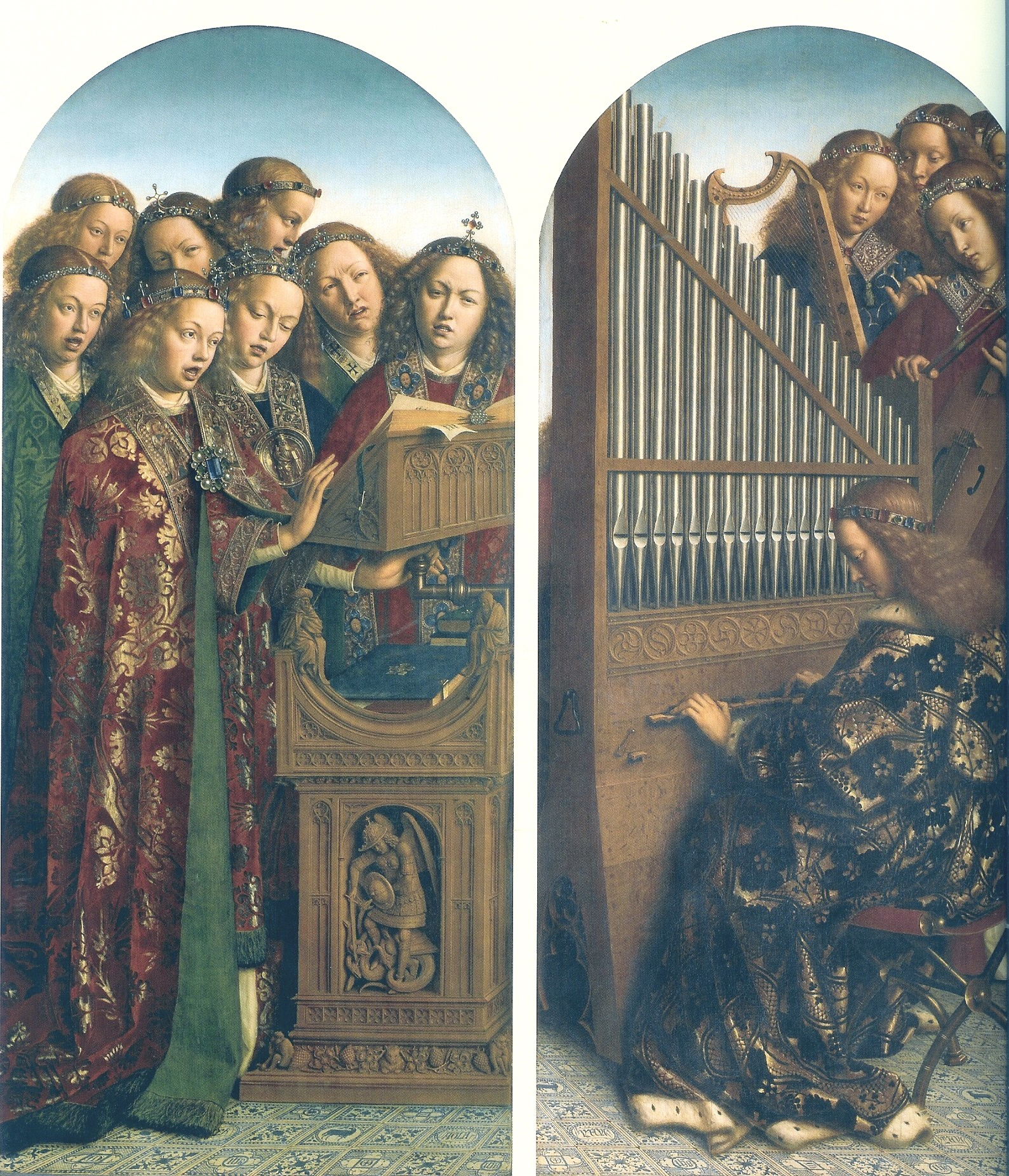 detail: Angels